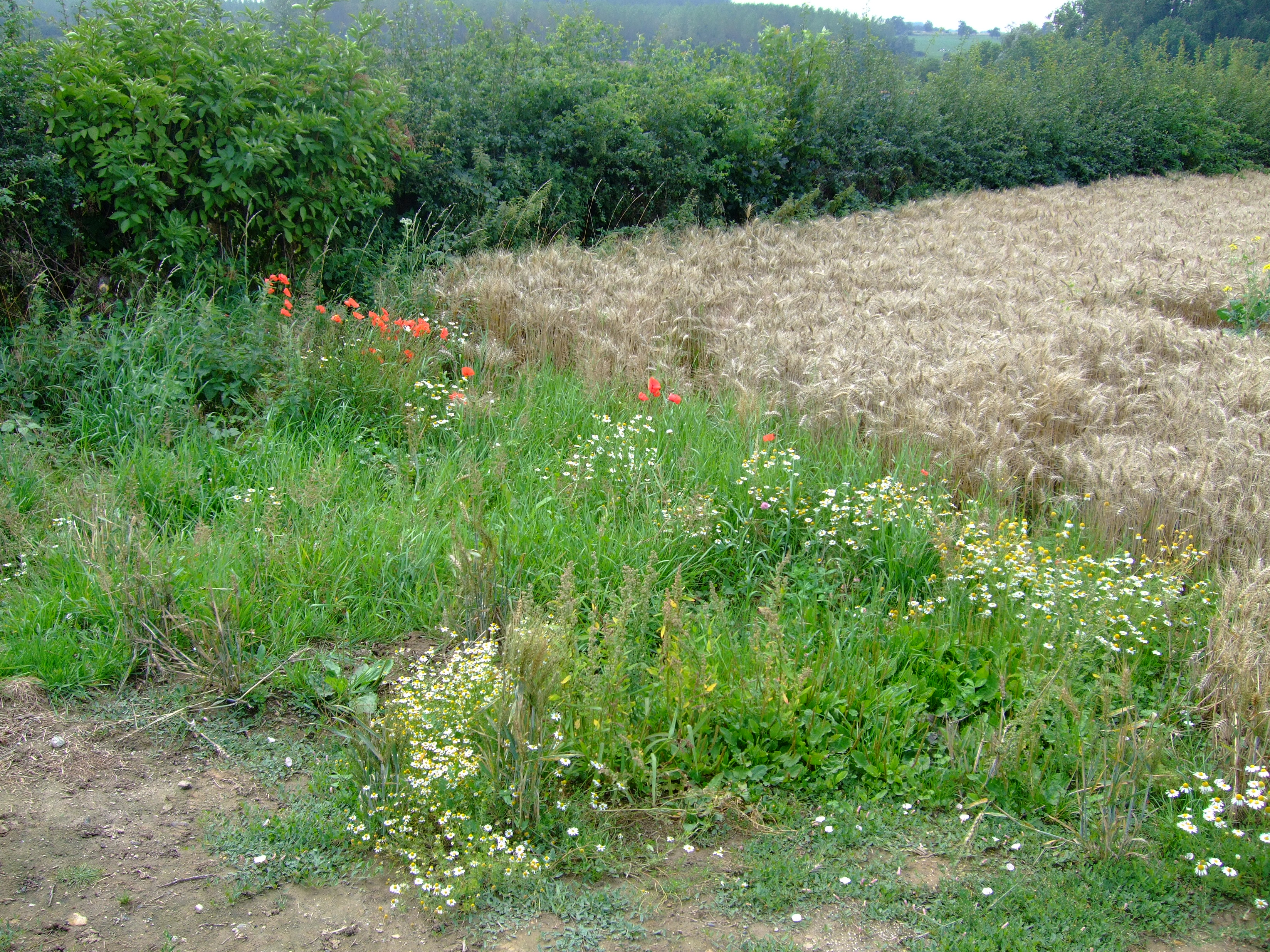 Les bordures de champs anguleuses sont favorables au développement des messicoles